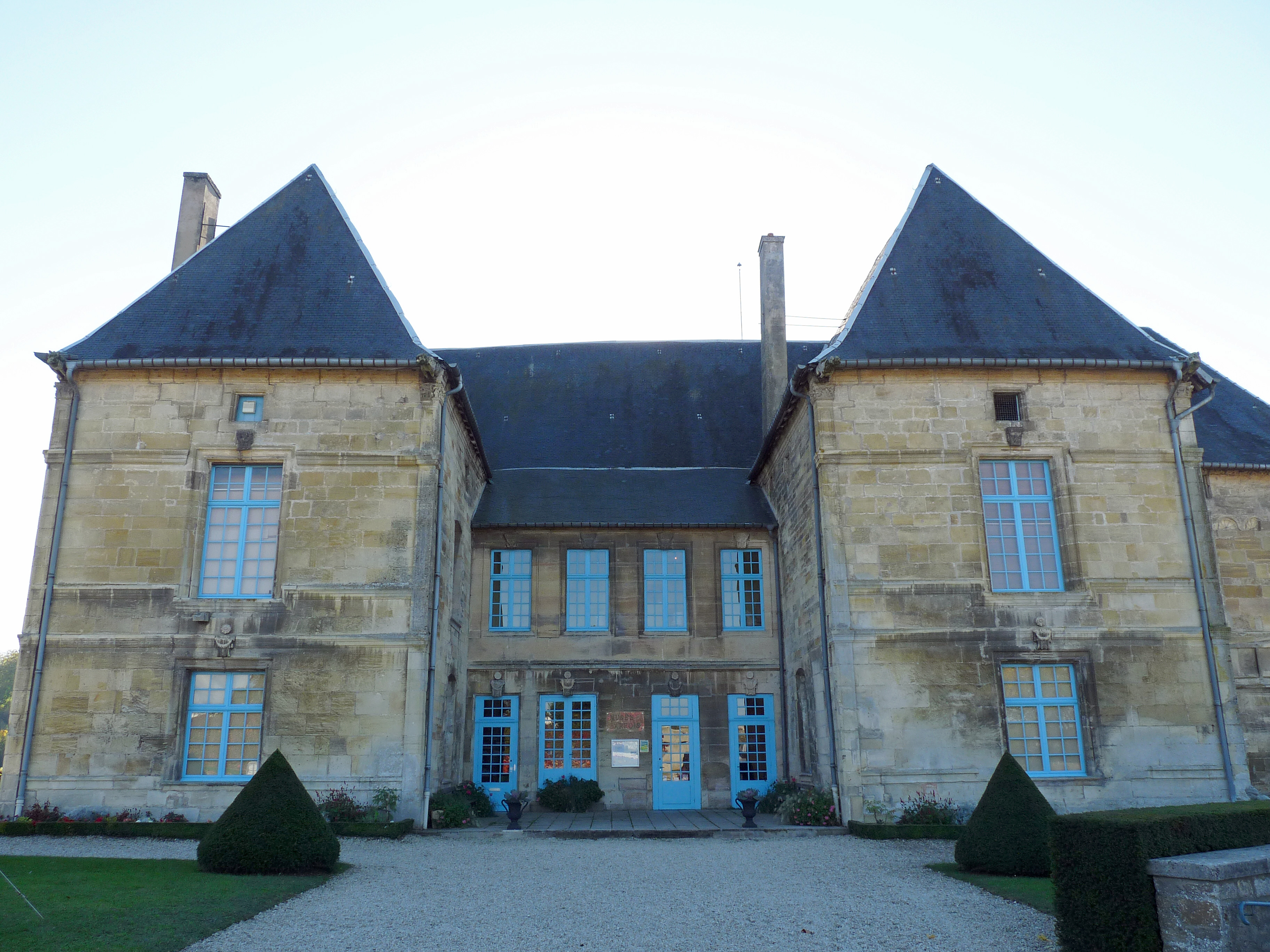 Bar-le-Duc : Château des ducs de Bar (abritant le Musée barrois)